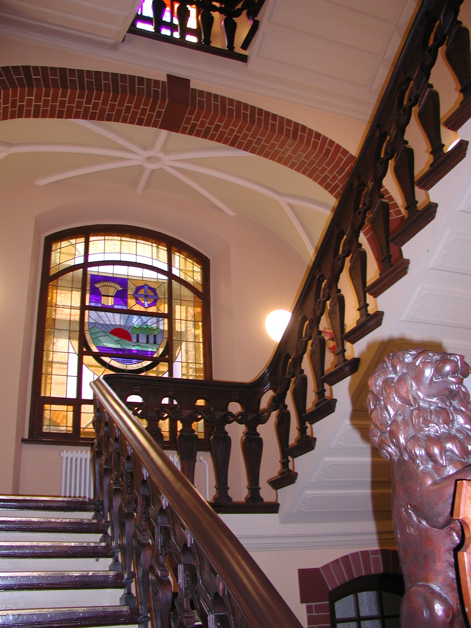 Rathaus Lichtenberg - Die Haupttreppe vom Eingangsbereich aus gesehen